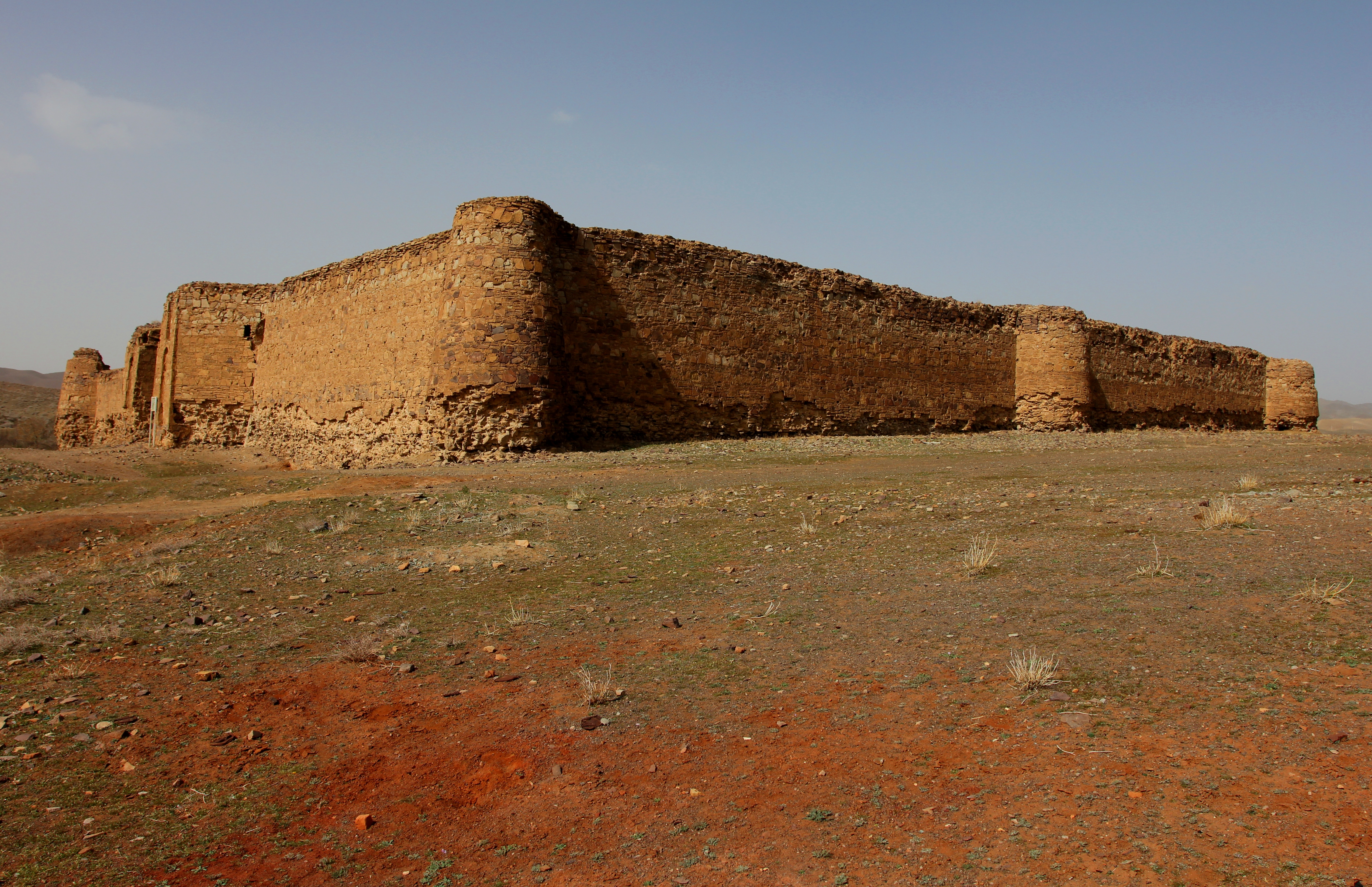 کاروانسرای سنگی علی‌آباد